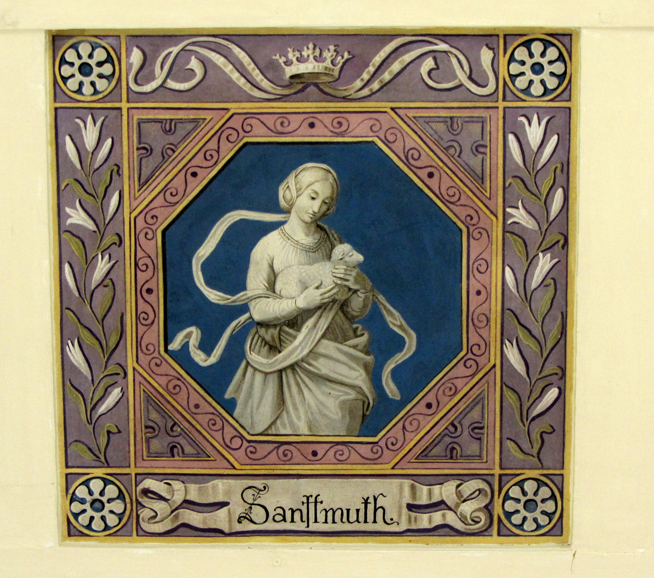 Maria im Busch - Deckenfresken